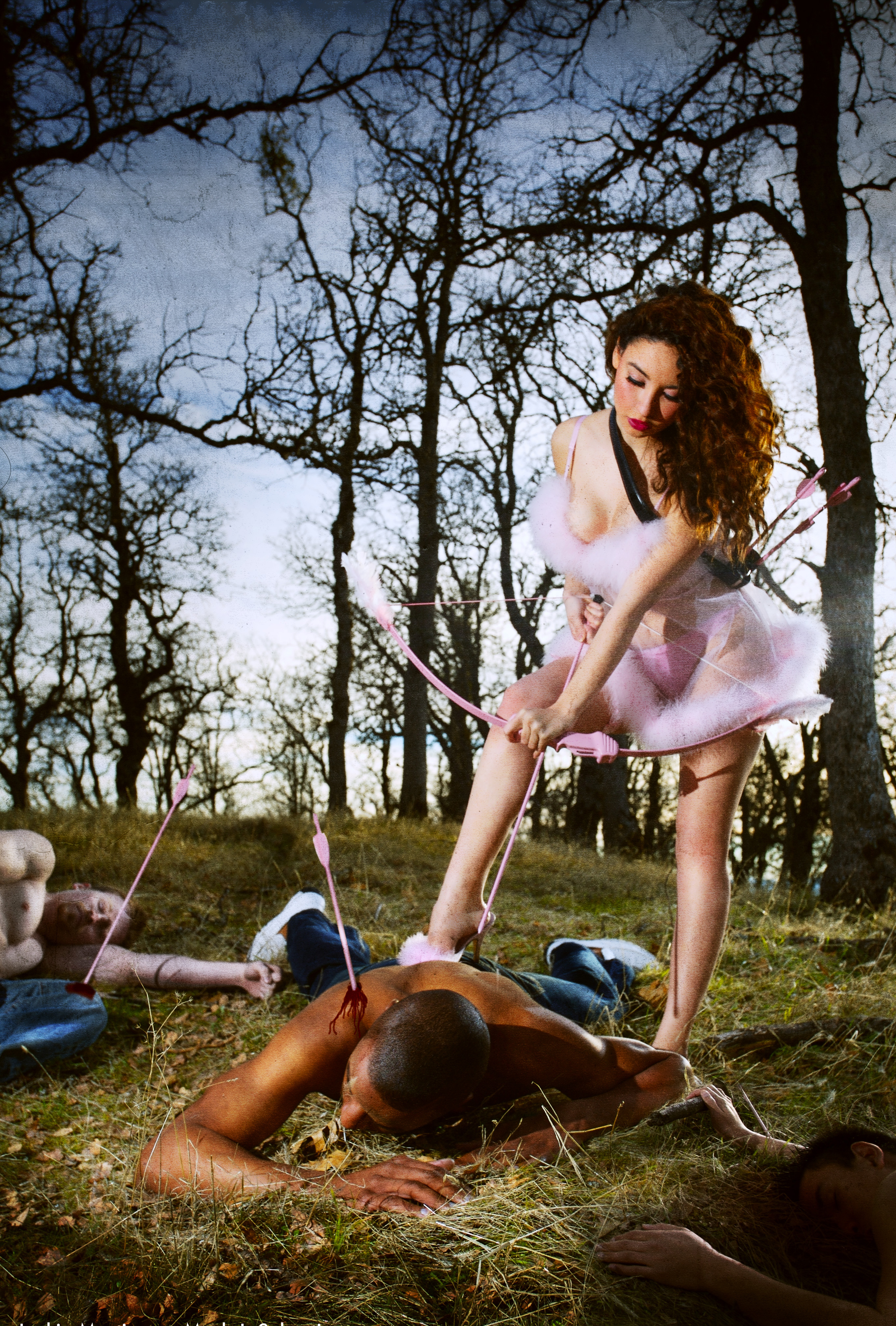 Singer Jackie Martinez.